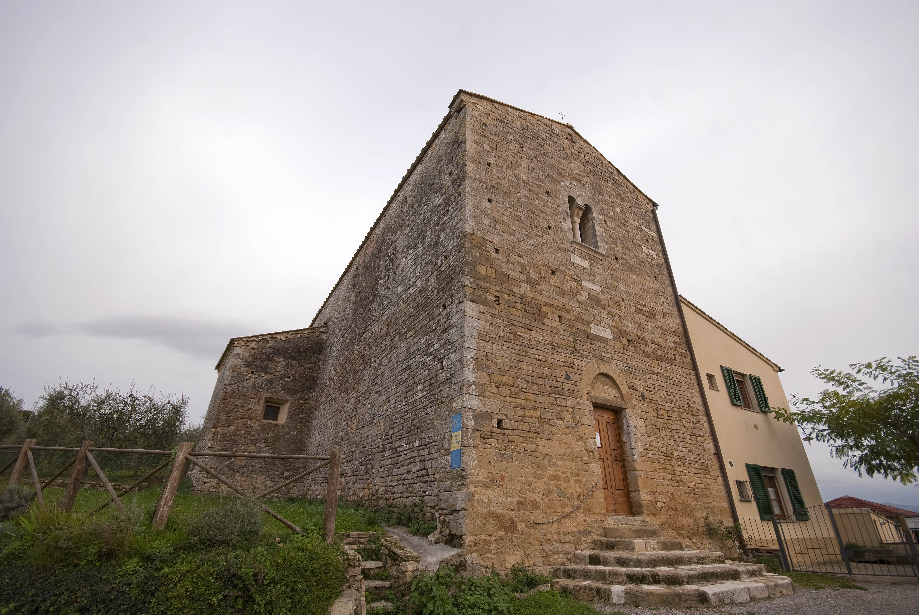 Chiesa di Sant'Andea a Papaiano - Poggibonsi - SI